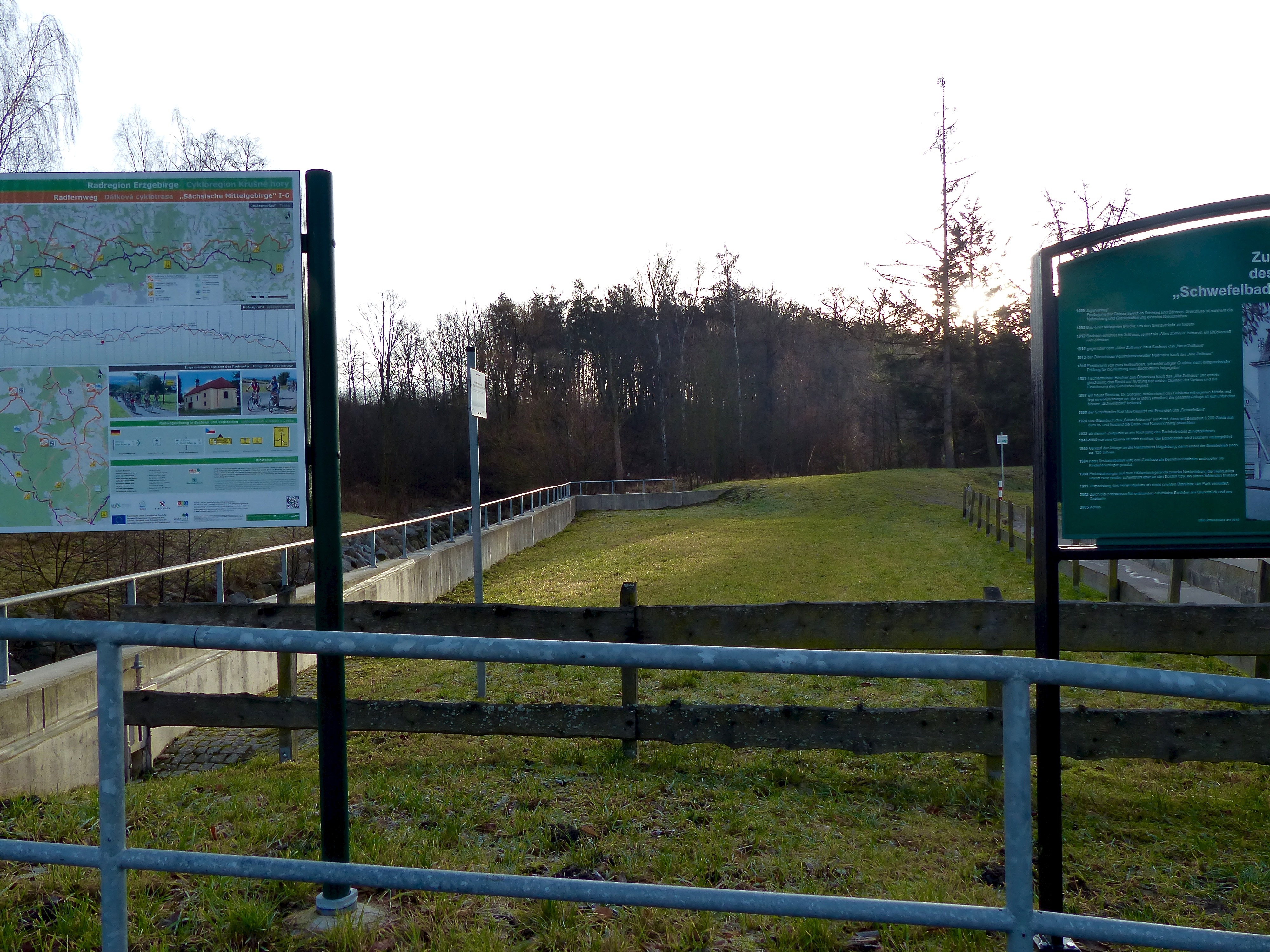 Stelle des 2005 abgerissenen Schwefelbades in Grünthal, Zustand Dezember 2015